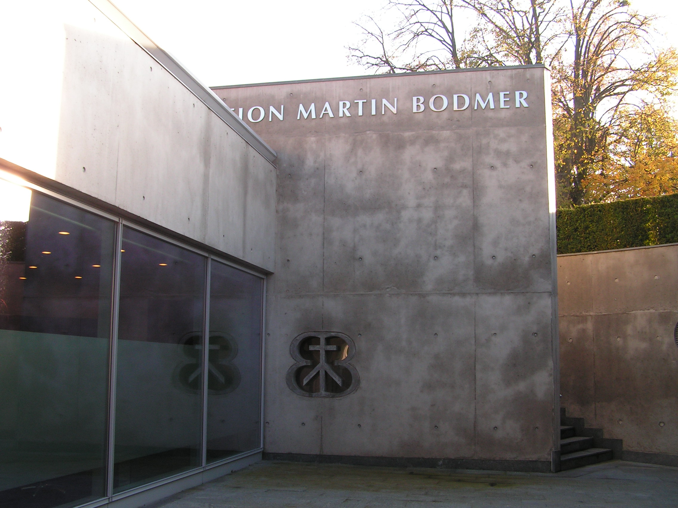 Fondation Martin Bodmer à Cologny, Genève